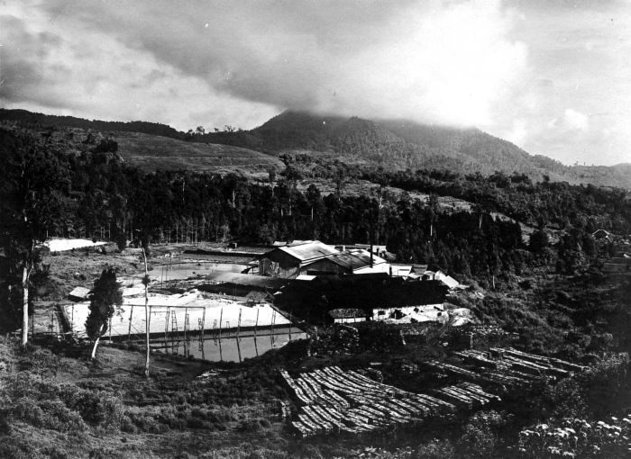 Repronegatief. Een zwavelfabriek bij Kawah Poetih, Midden-Priangan, West-Java